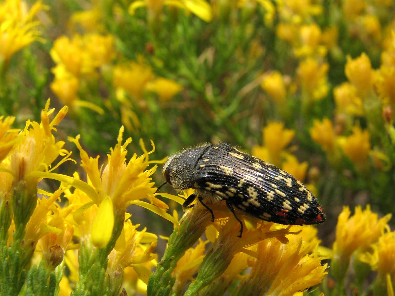 Buprestoidea - Acmaeodera rubronotata